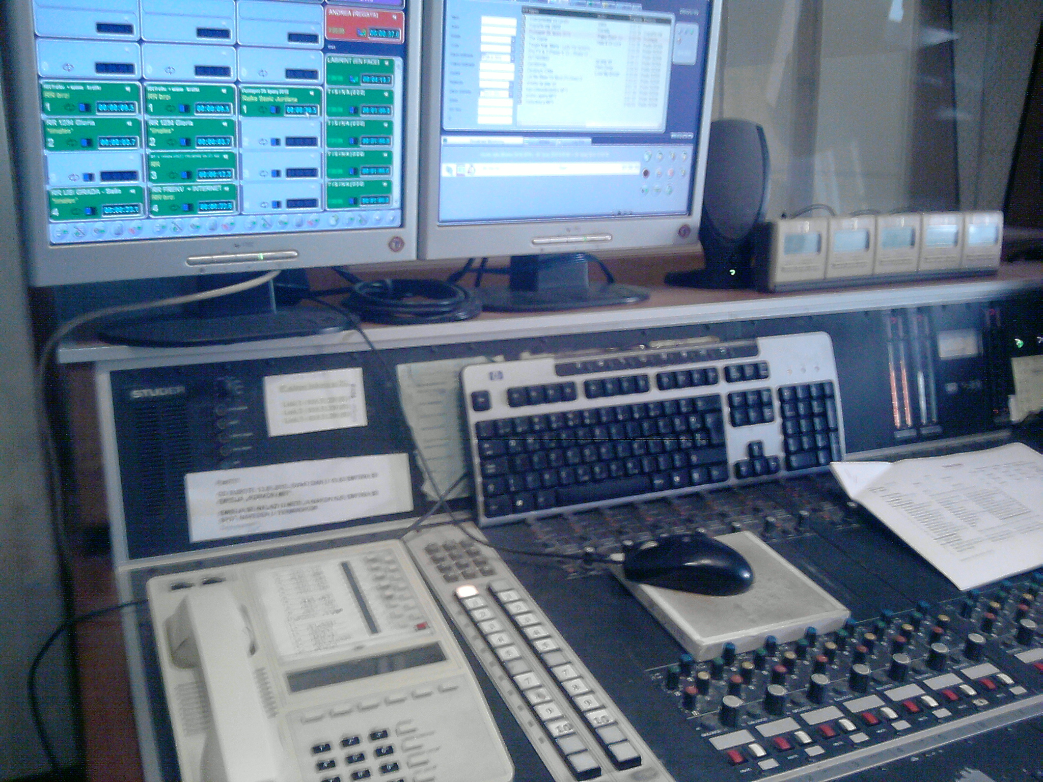 Pogled glavnog tonskog stola u RR